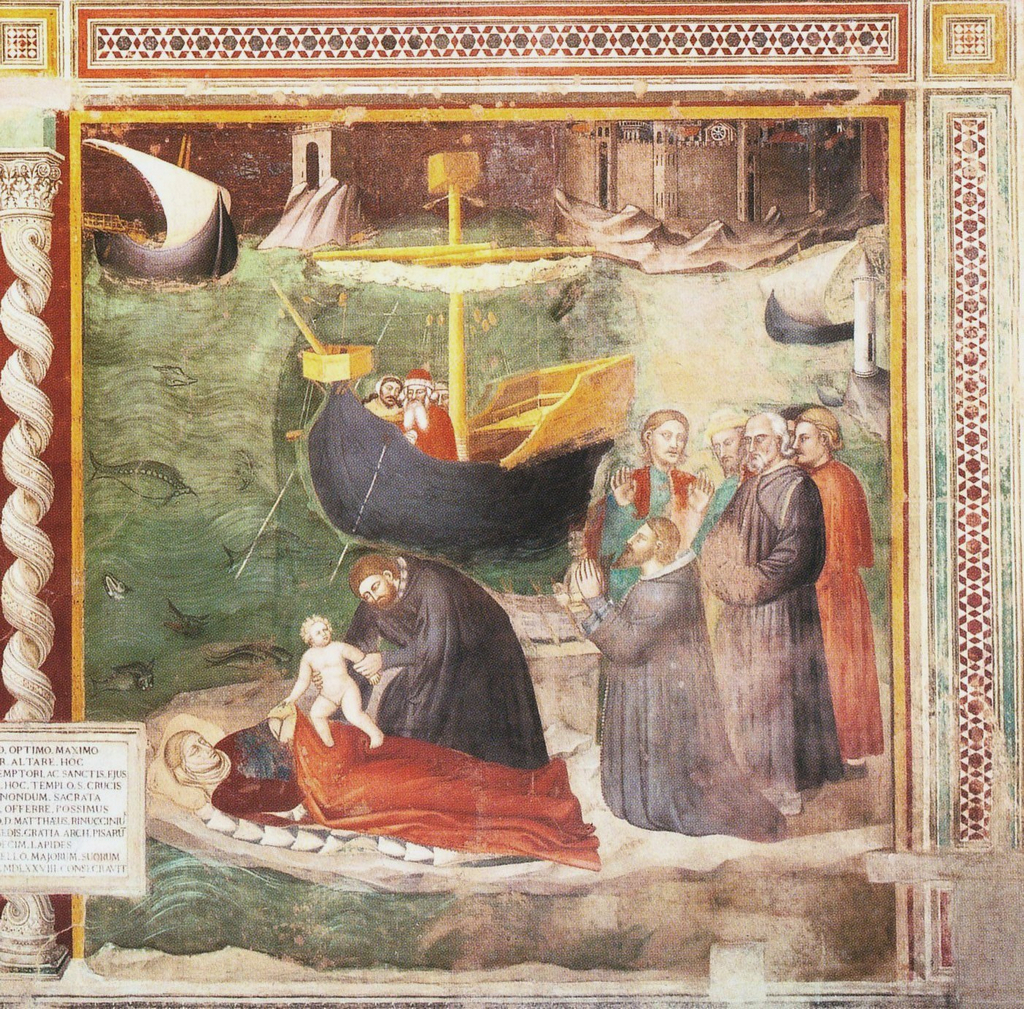 Cappella rinuccini